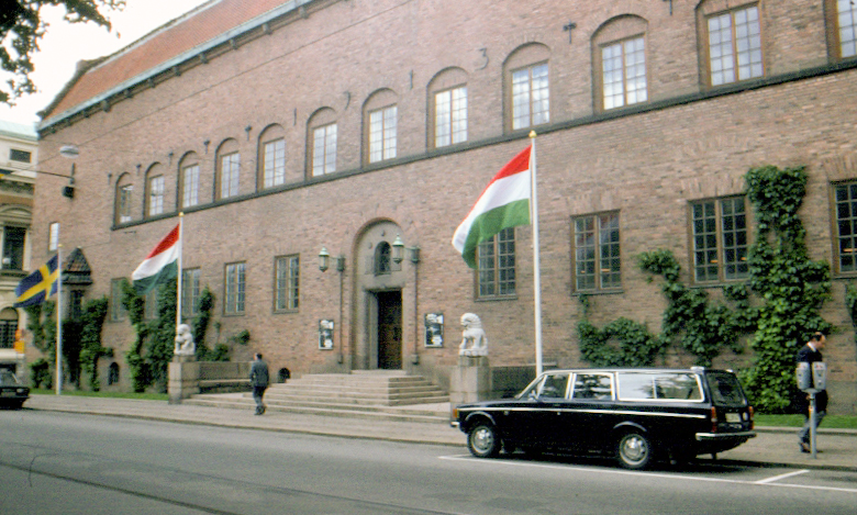 Röhsska museet